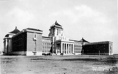 State council of Manchukuo（满洲国国务院）